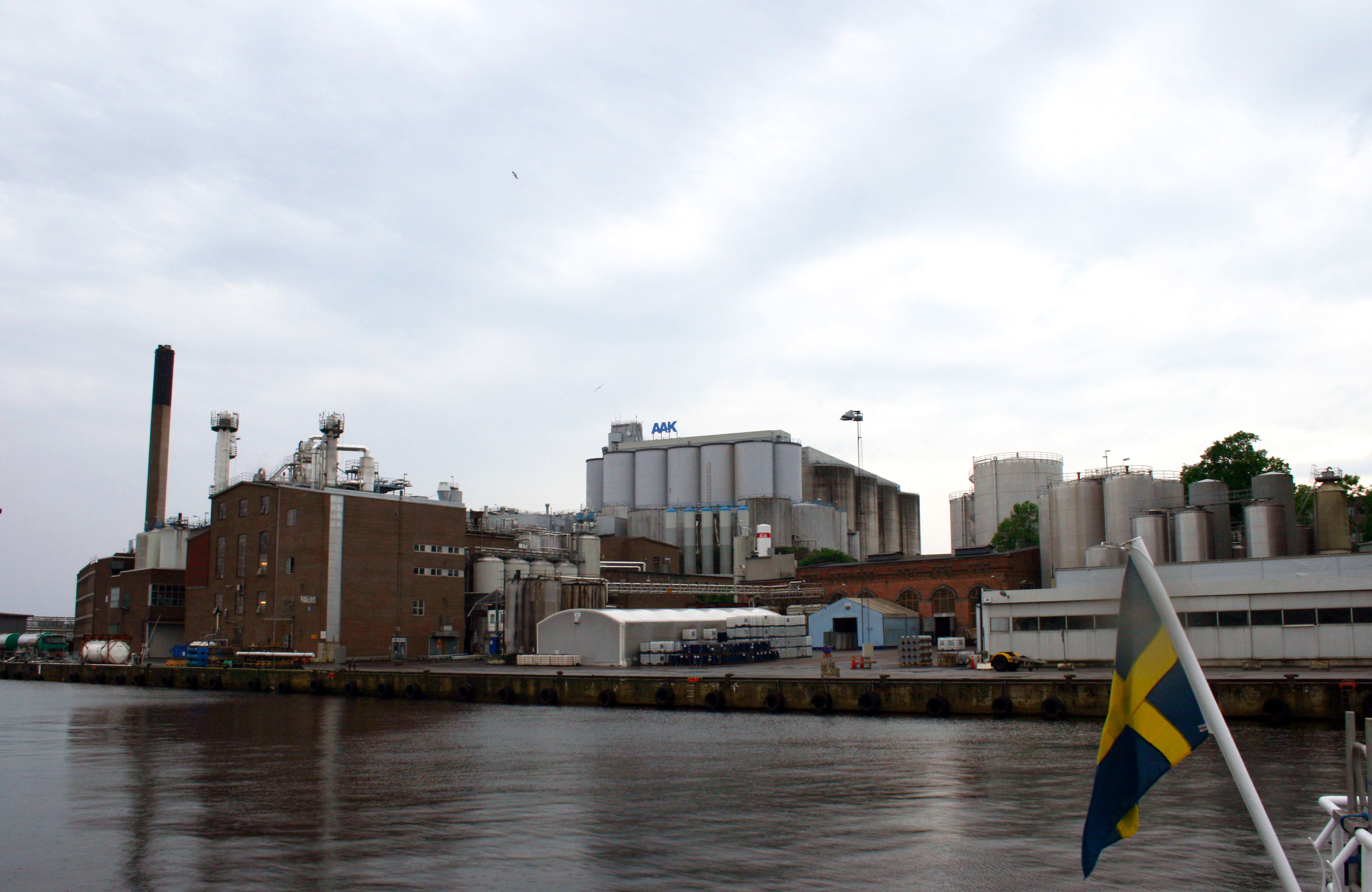 Några av AarhusKarlshamns byggnader i Karlshamn